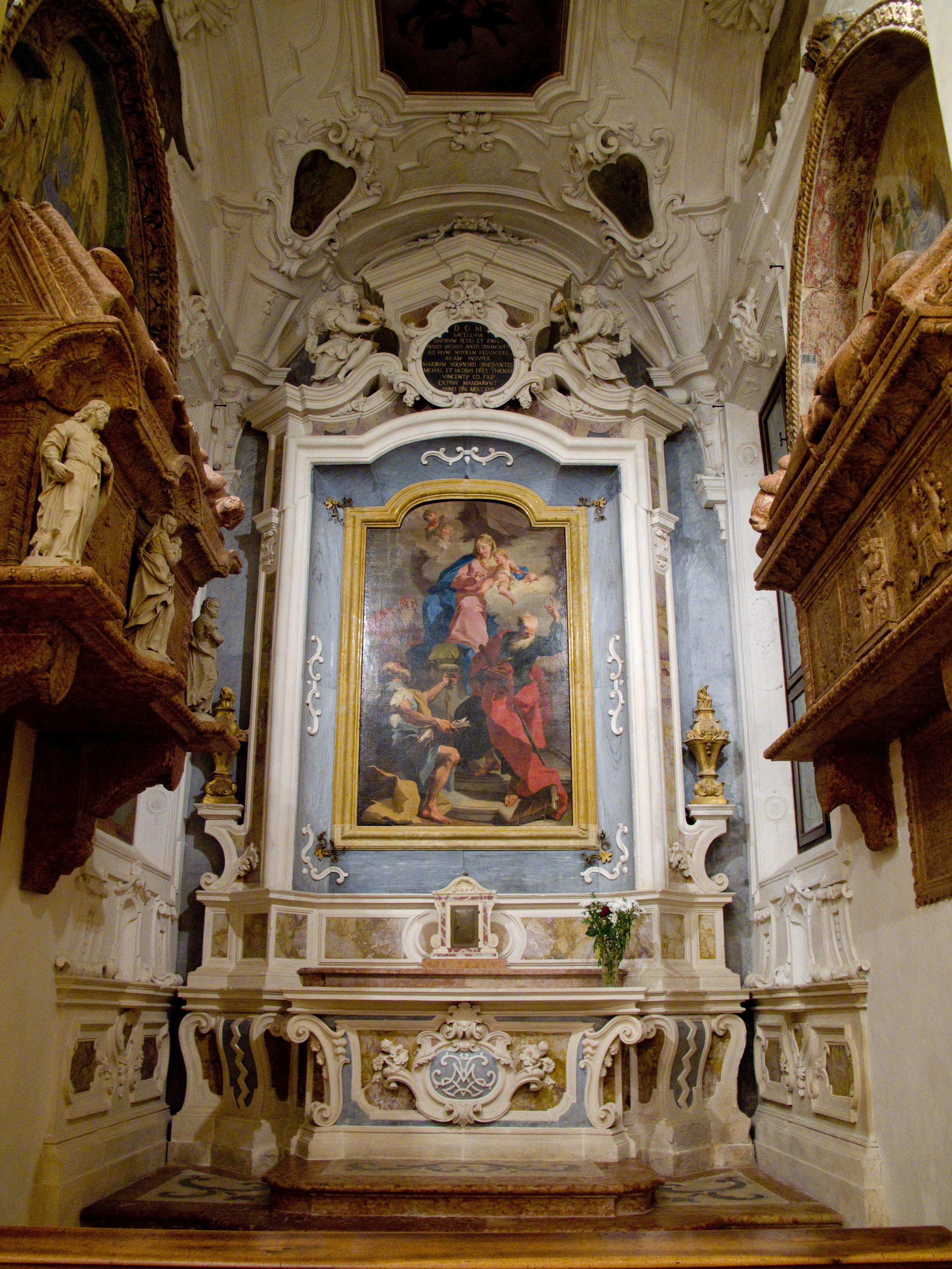 Vicenza - Chiesa di Santa Corona - Cappella Thiene